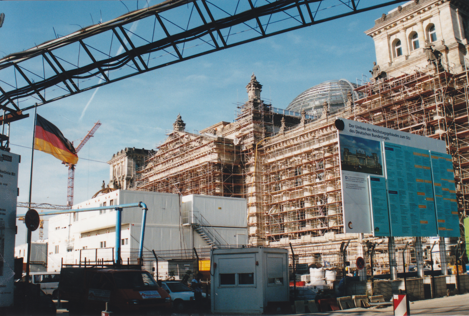 Deitsch: Reichstags-Baustelle 1998